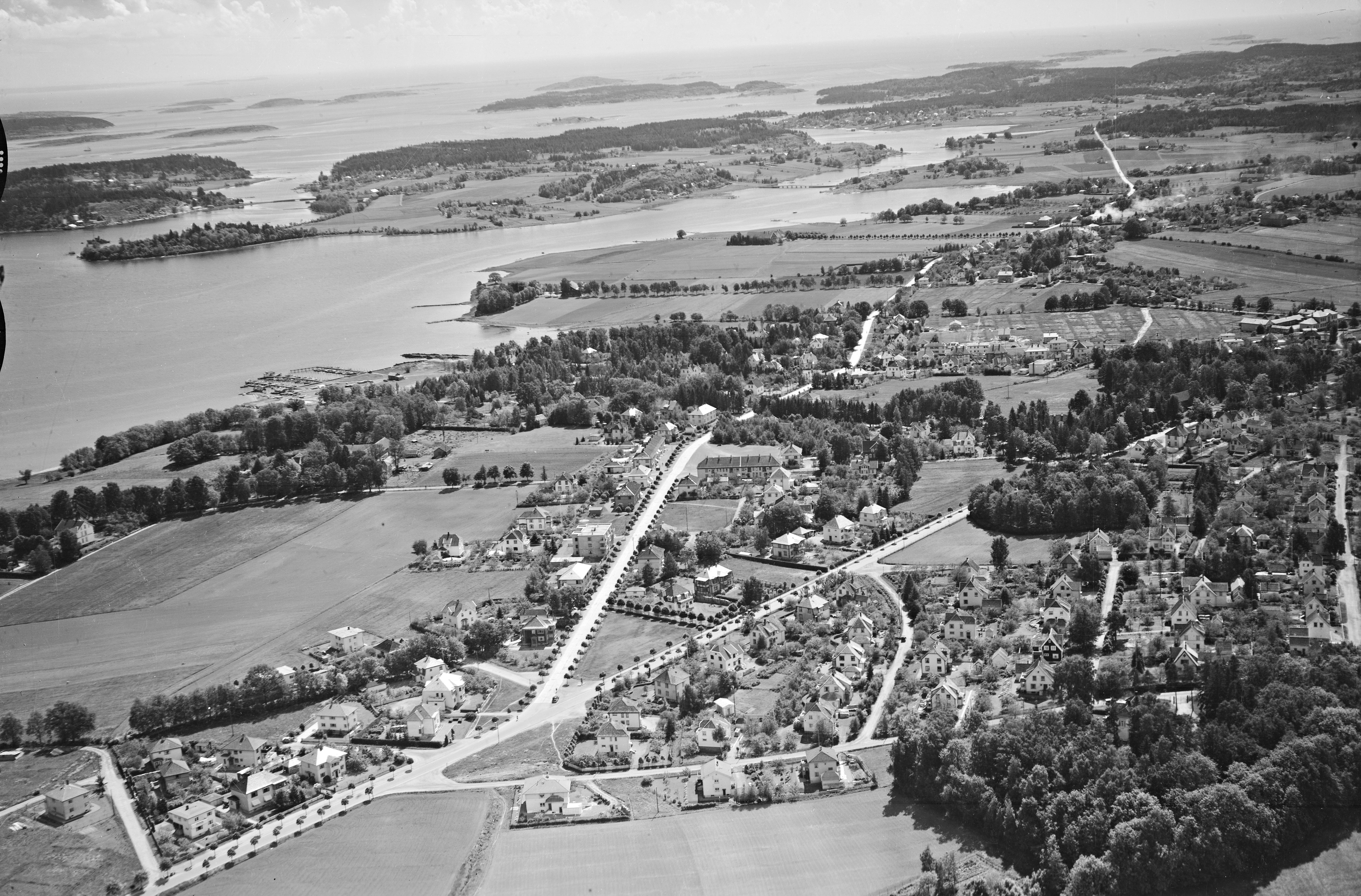 WF.S.10291